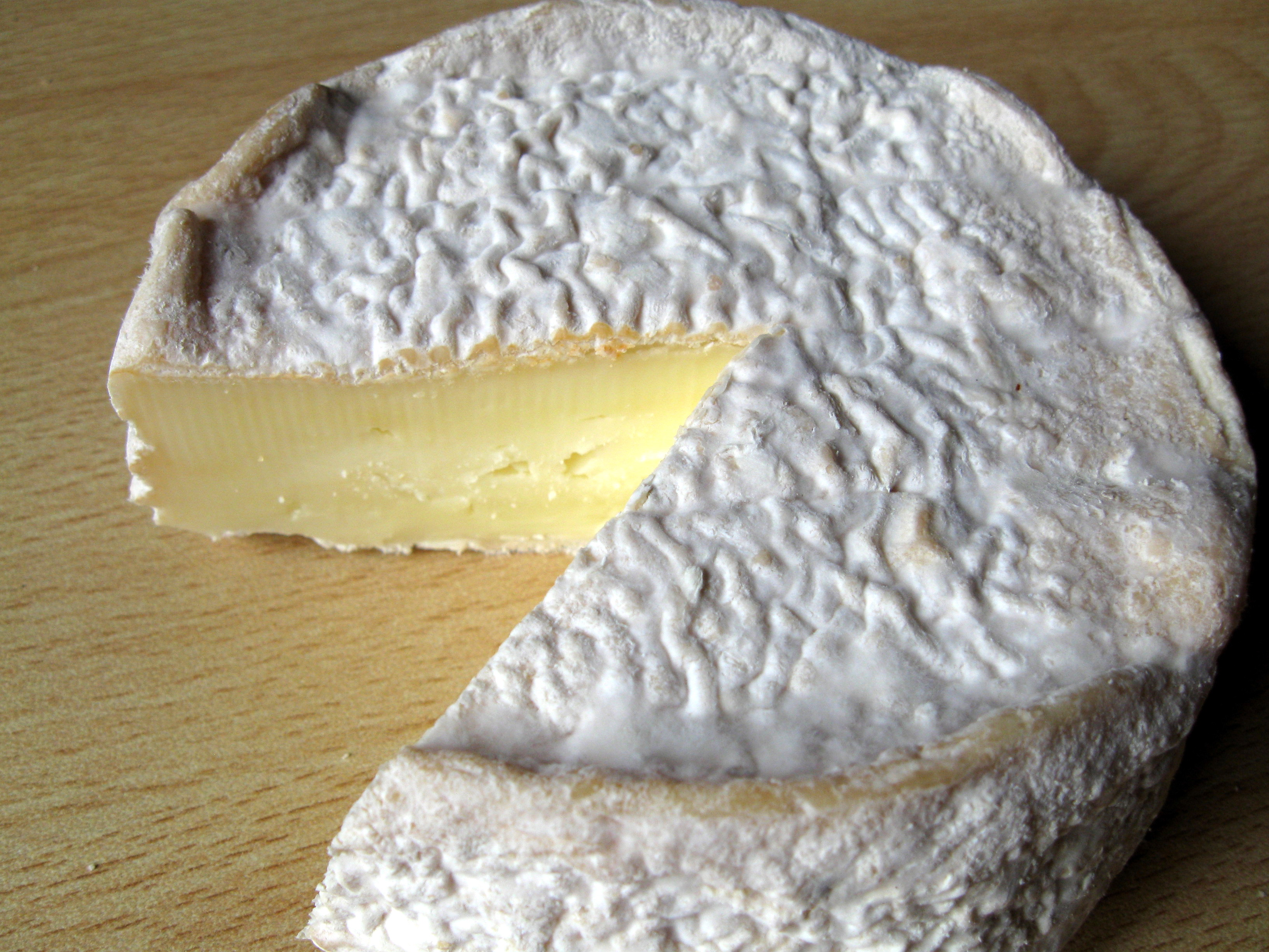 Il murazzano DOP è un formaggio italiano di latte principalmente ovino prodotto nella provincia di Cuneo.